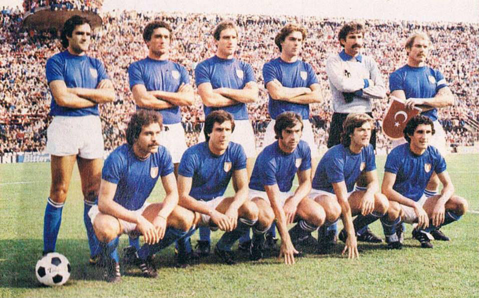 Firenze, stadio Comunale, 23 settembre 1978. La formazione dell'Italia scesa in campo contro la Turchia nella gara amichevole vinta dagli azzurri per 1-0. In piedi, da sinistra: A. Cuccureddu, C. Gentile, F. Graziani, L. Manfredonia, P. Conti, R. Benetti (capitano); accosciati: F. Causio, G. Scirea, P. Pulici, G. Antognoni, P. Sala.